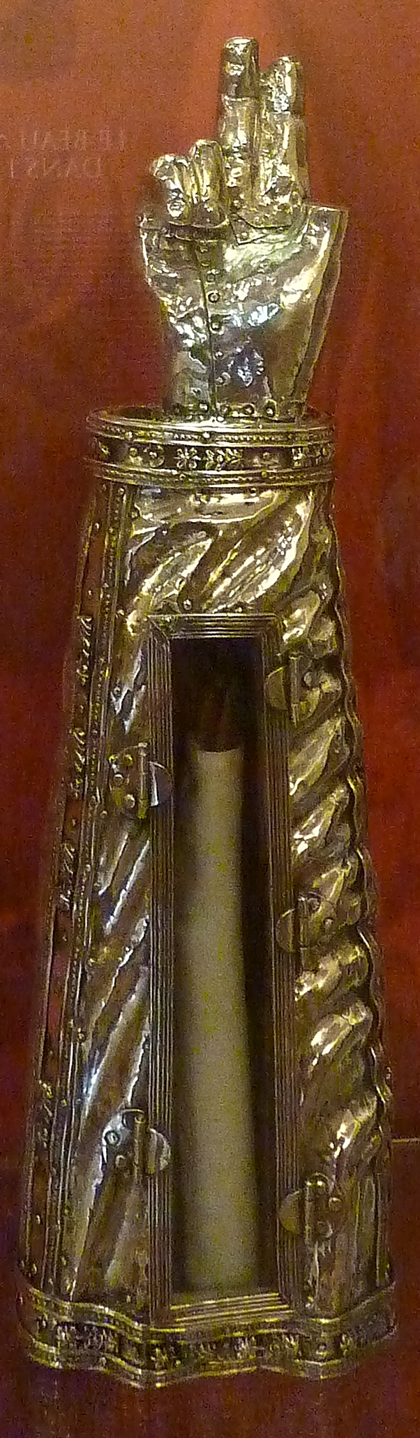 Saint-Jean-du-Doigt : Bras reliquaire contenant une relique de saint Maudez (vers 1500, orfèvre Jean Guehannet [de Morlaix], argent repoussé et dorure, musée départemental breton)